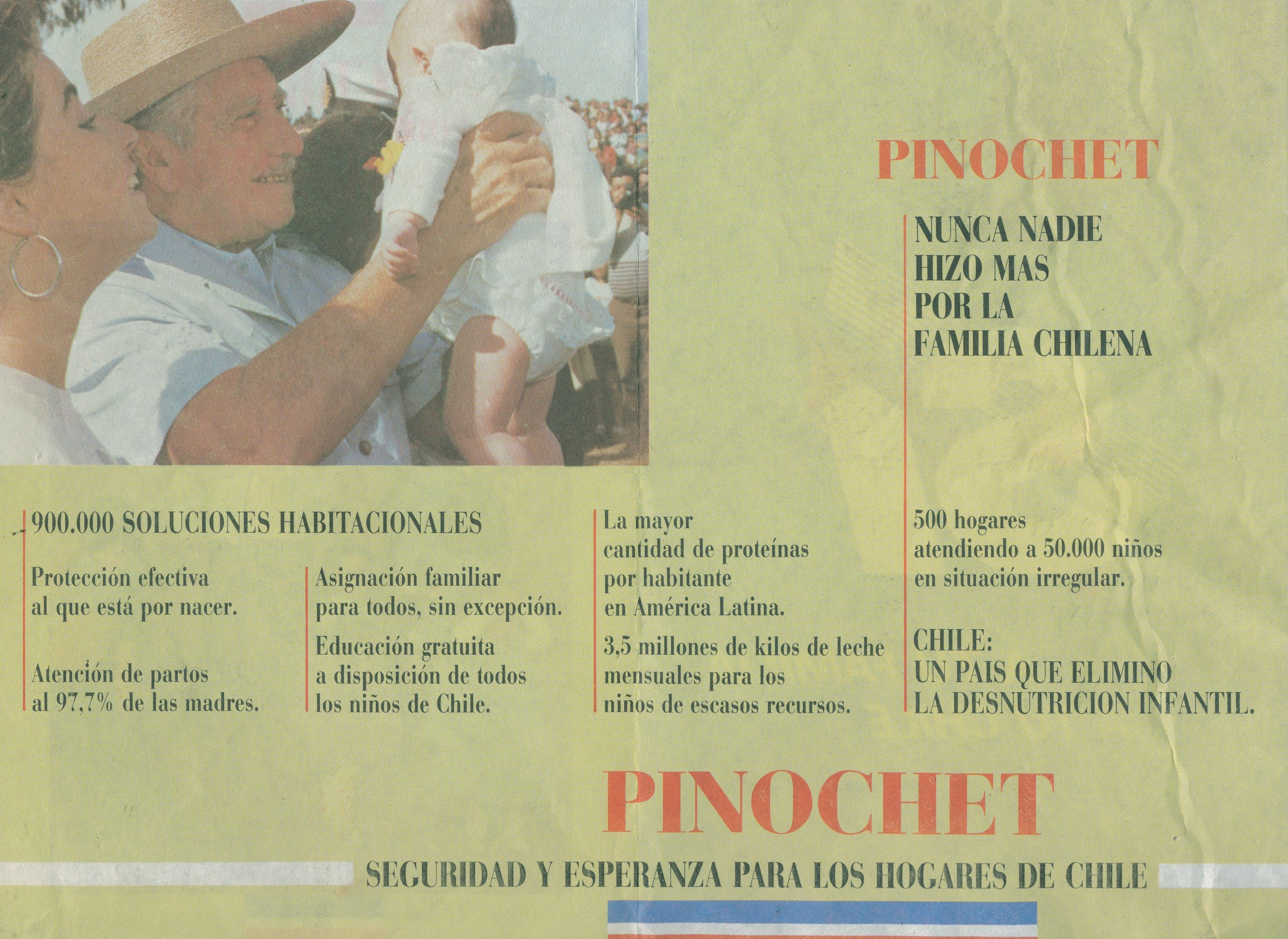 Chile. El 5 de octubre de 1988 se realizó un Plebiscito Nacional que definiría la permanencia en el poder del Régimen Militar hasta 1997 y de Augusto Pinochet como su máximo representante. Este es un panfleto de la campaña de apoyo a Pinochet y al voto por el Si.